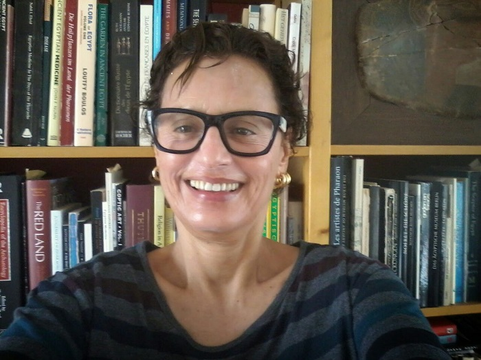 Elisabeth Mader do Amaral Gurgel - Bebeti